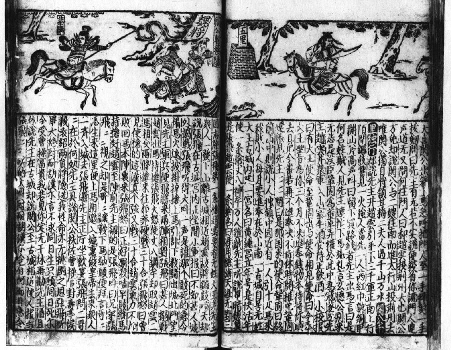 Quan Xiang Ping Hua San Guo Zhi (至治新刊全相平話三國志), 14th century, China.